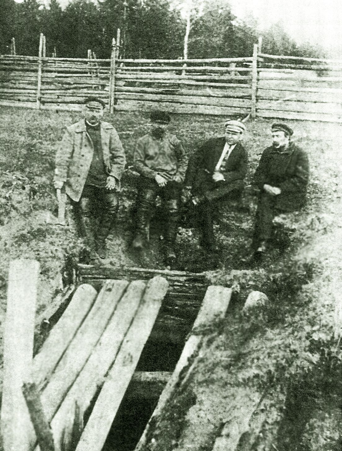 Алапаевская шахта. Скан фото, приведённого в книге : Завьялова Л.,Орлов К.Великий князь Константин Константинович и великие князья Константиновичи. СПб.2009. ISBN 978-5-93898-225-3